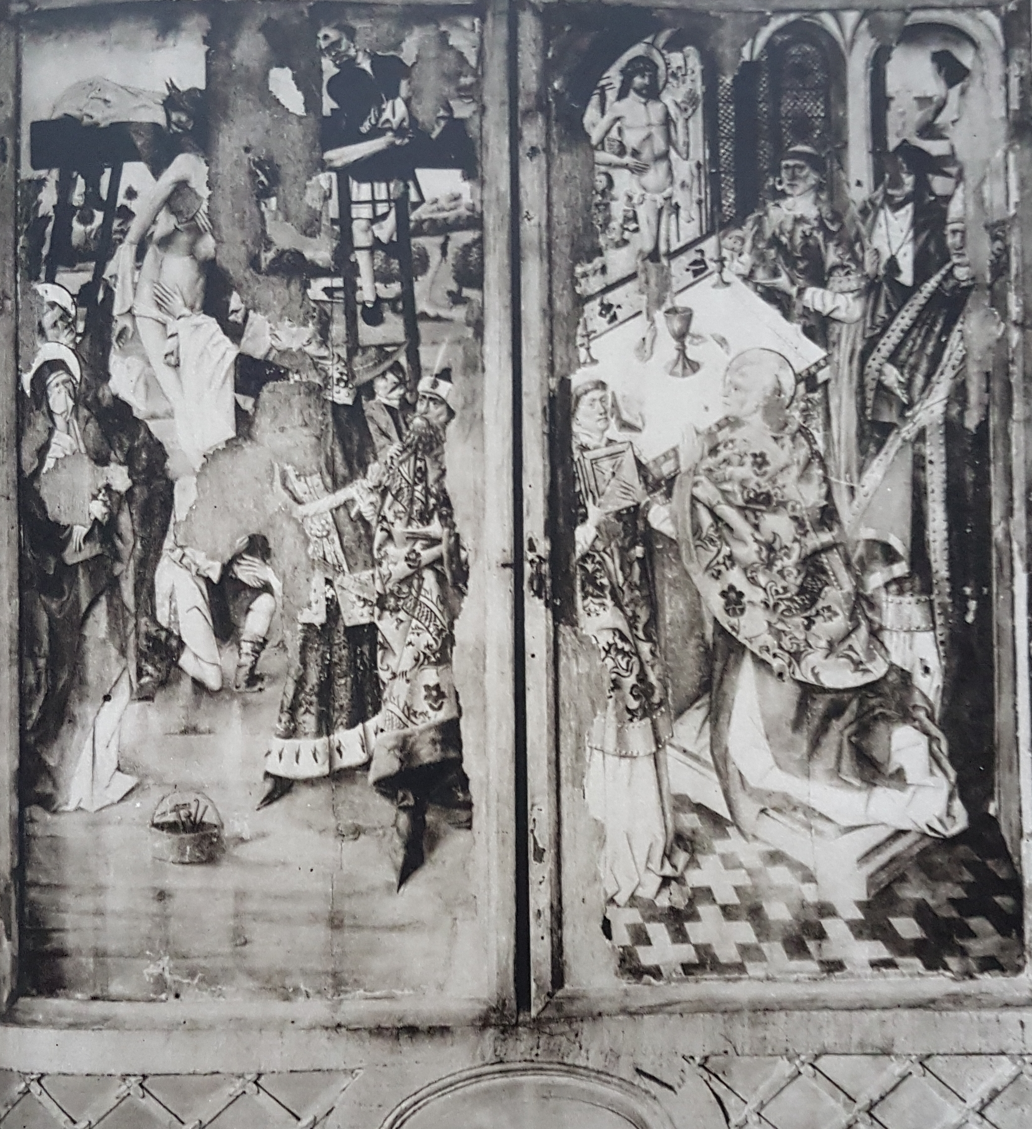 Altarskåp Boglösa kyrka utfört av Bertil Målare, avfotograferad bild från Allhems Svenskt konstnärslexikon.